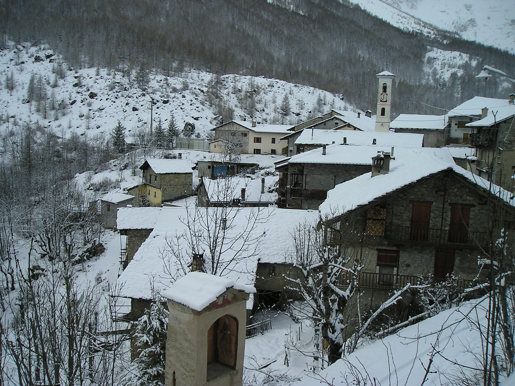 Frazione di Saretto, appartenente al comune di Acceglio.